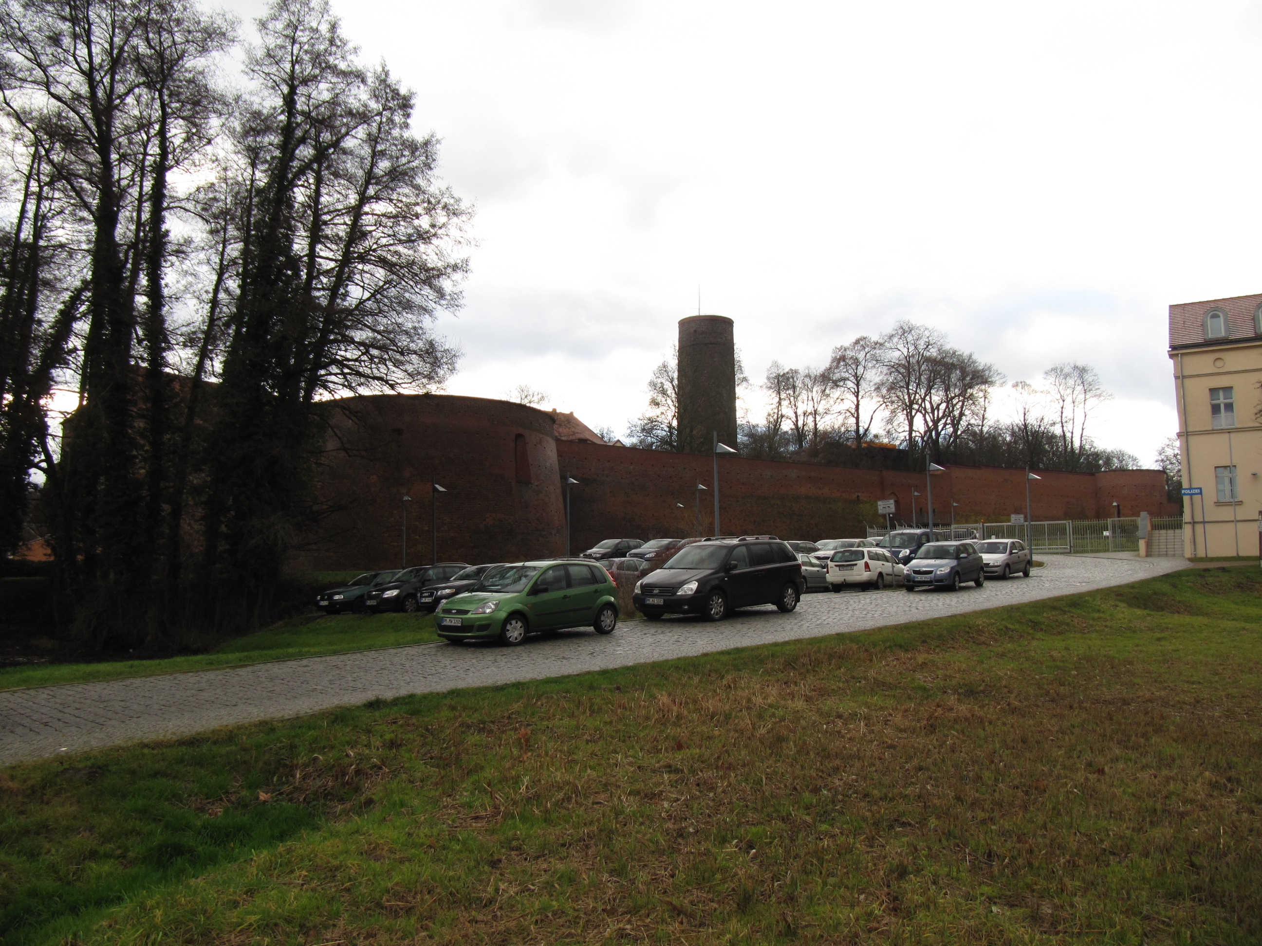 nördliche außenmauern burg eisenhardt